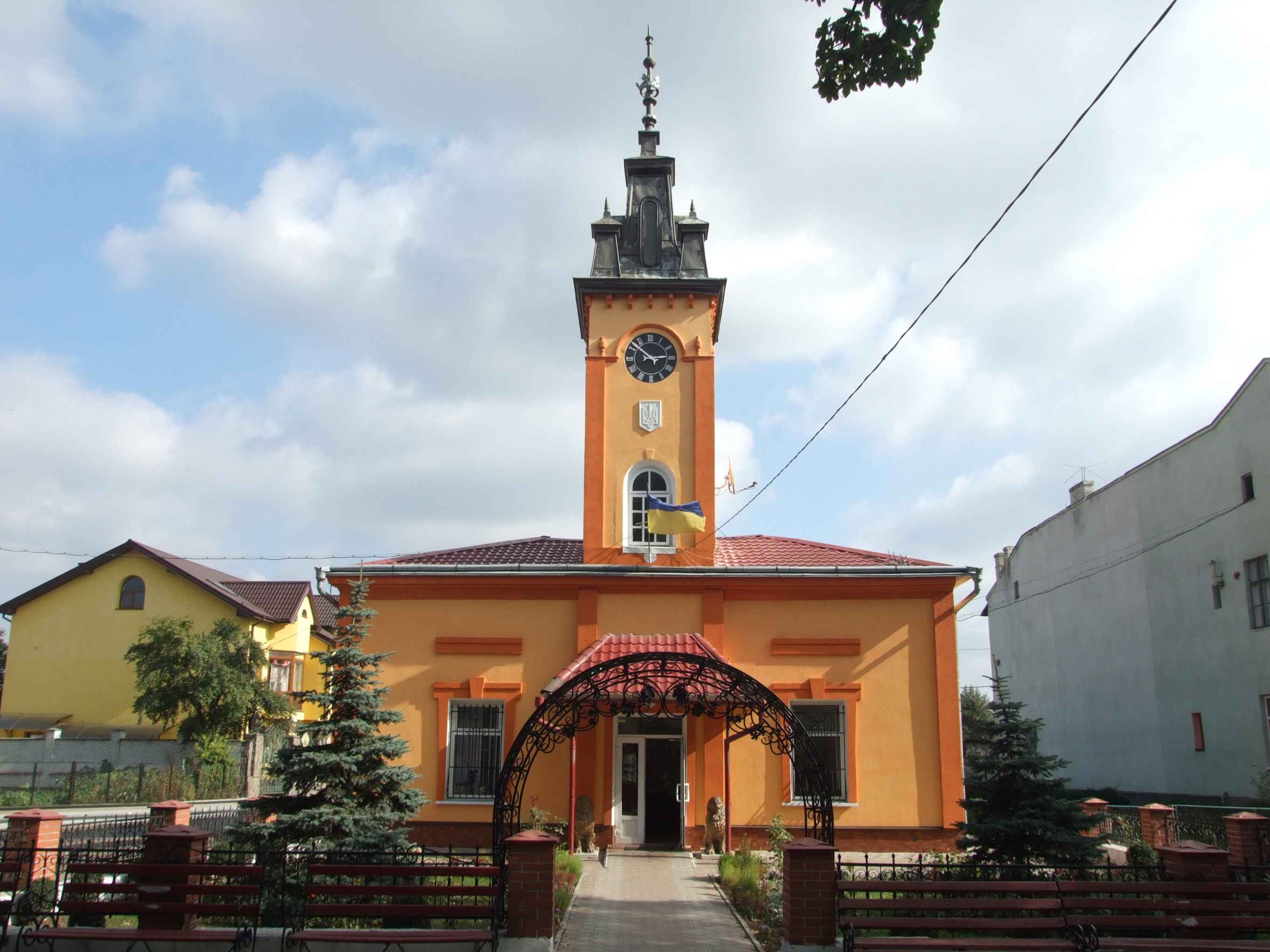 Ратуша, 18 ст.